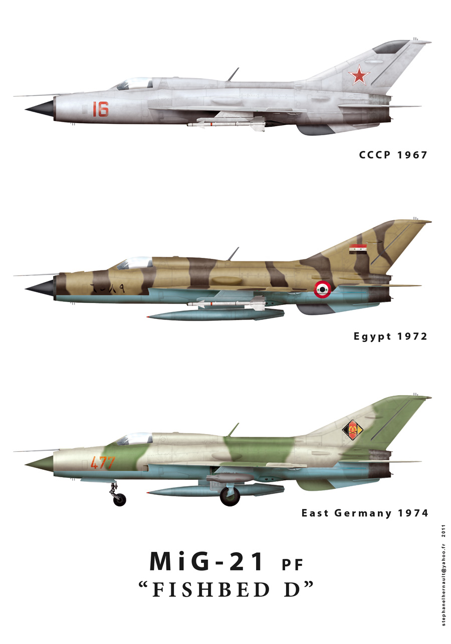 mig21 PF fishbed D variantes URSS Allemagne de l est Egypte